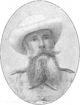 El excelentísimo señor don Joaquín Vara del Rey